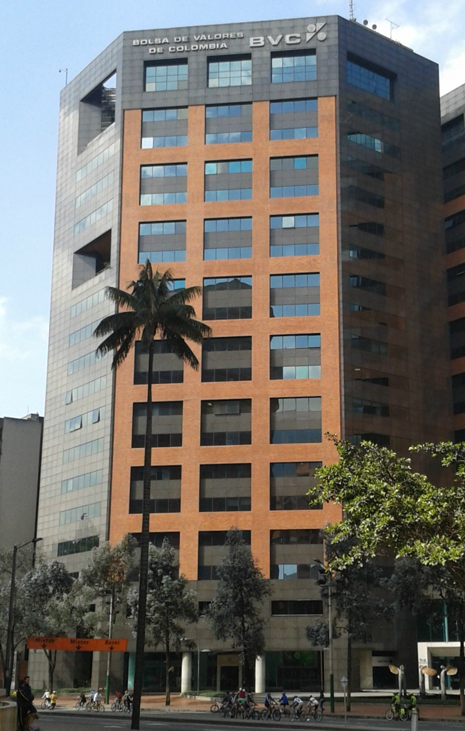 Bolsa de valores de Colombia el 21 de Diciembre de 2014